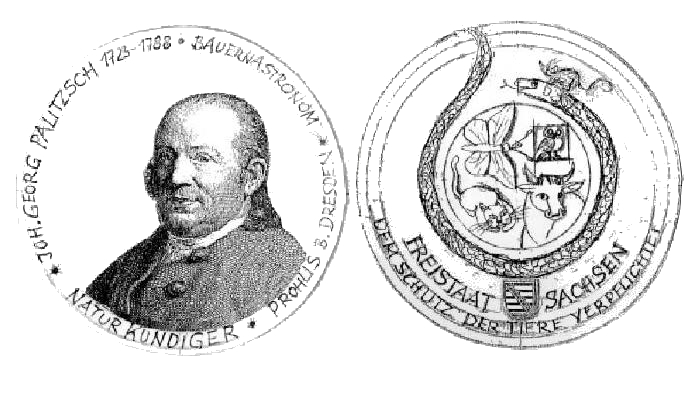 Amtliche Darstellung der Sächsischen Medaille Johann Georg Palitzsch (Sächsische Tierschutzmedaille)